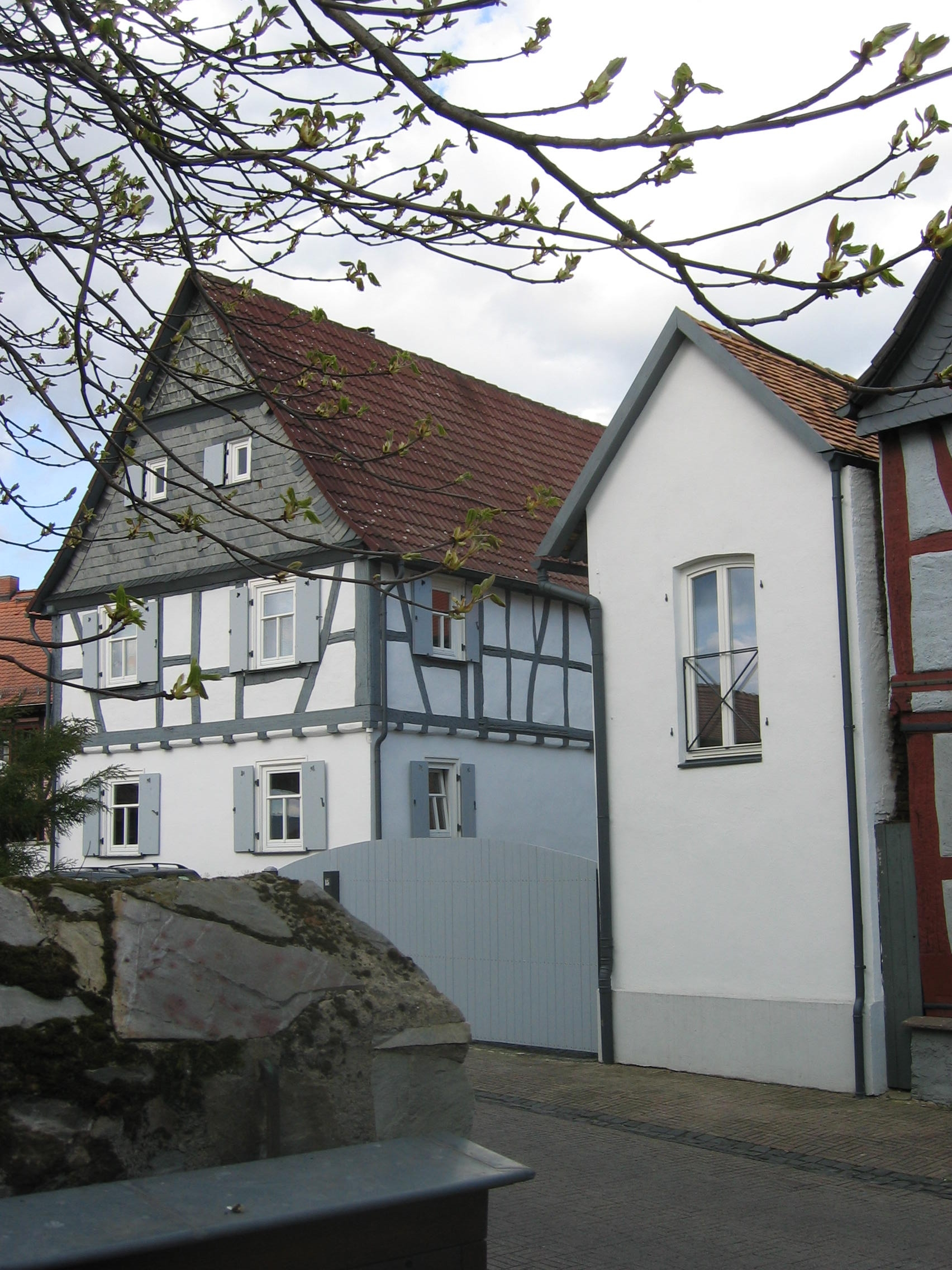 Ortsmitte Burgholzhausen (Friedrichsdorf; typische Bebauung (Sanierung einer Hofreite aus 1630 durch Architekt Christoph Wagener)